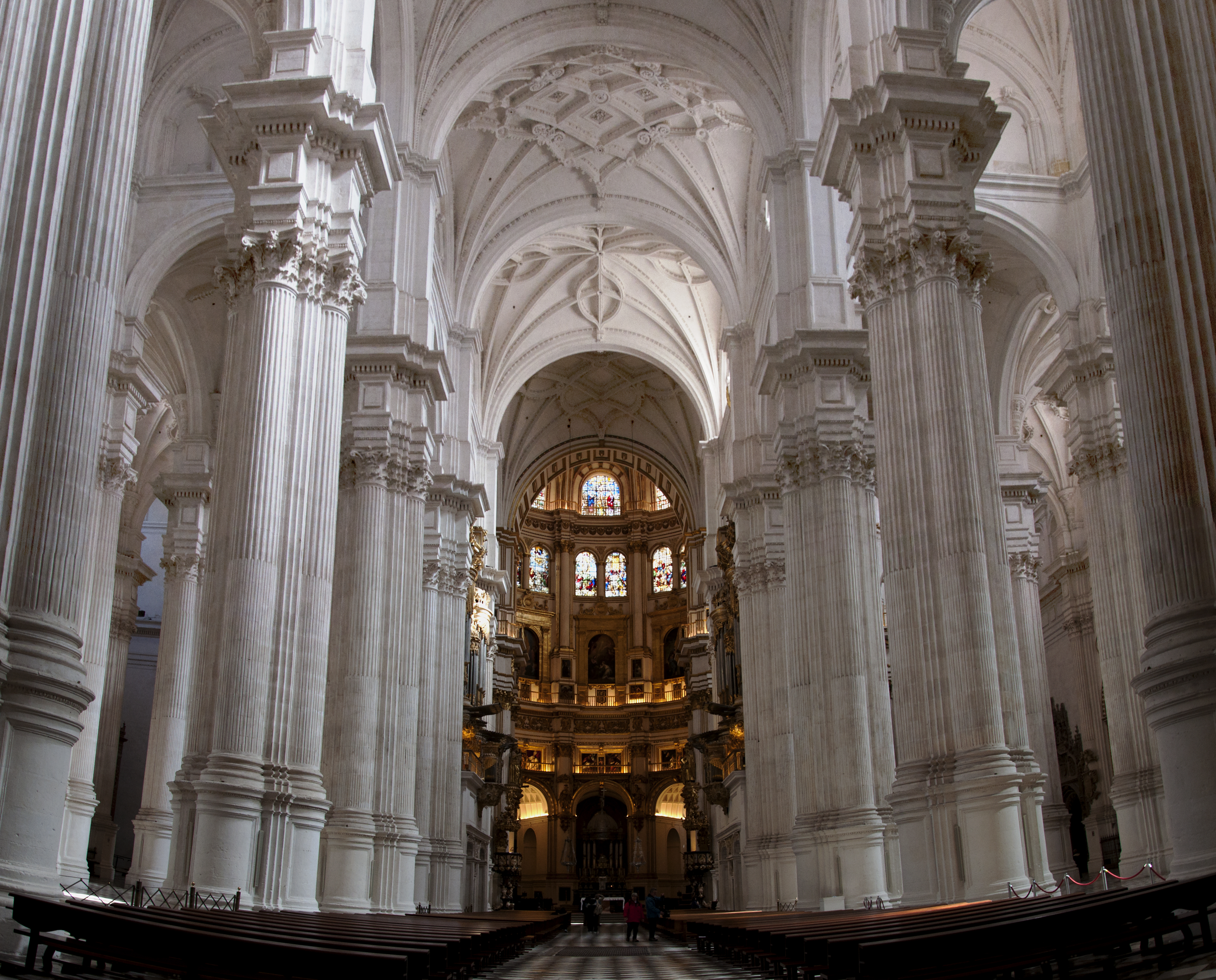 Granada - interieur van de kathedraal